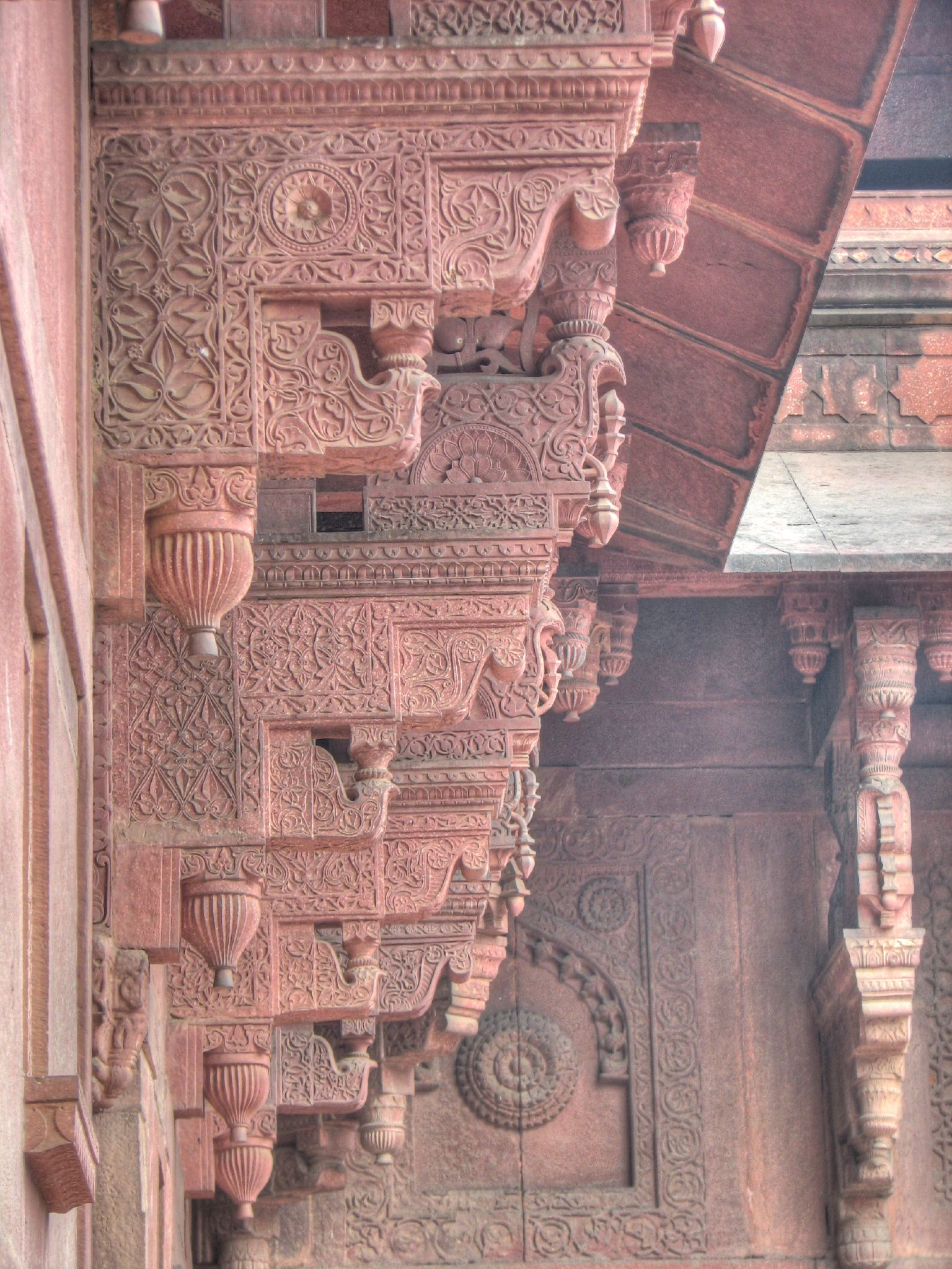 Agra Fort 09 HDR